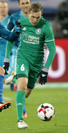 Лукаш Дроппа